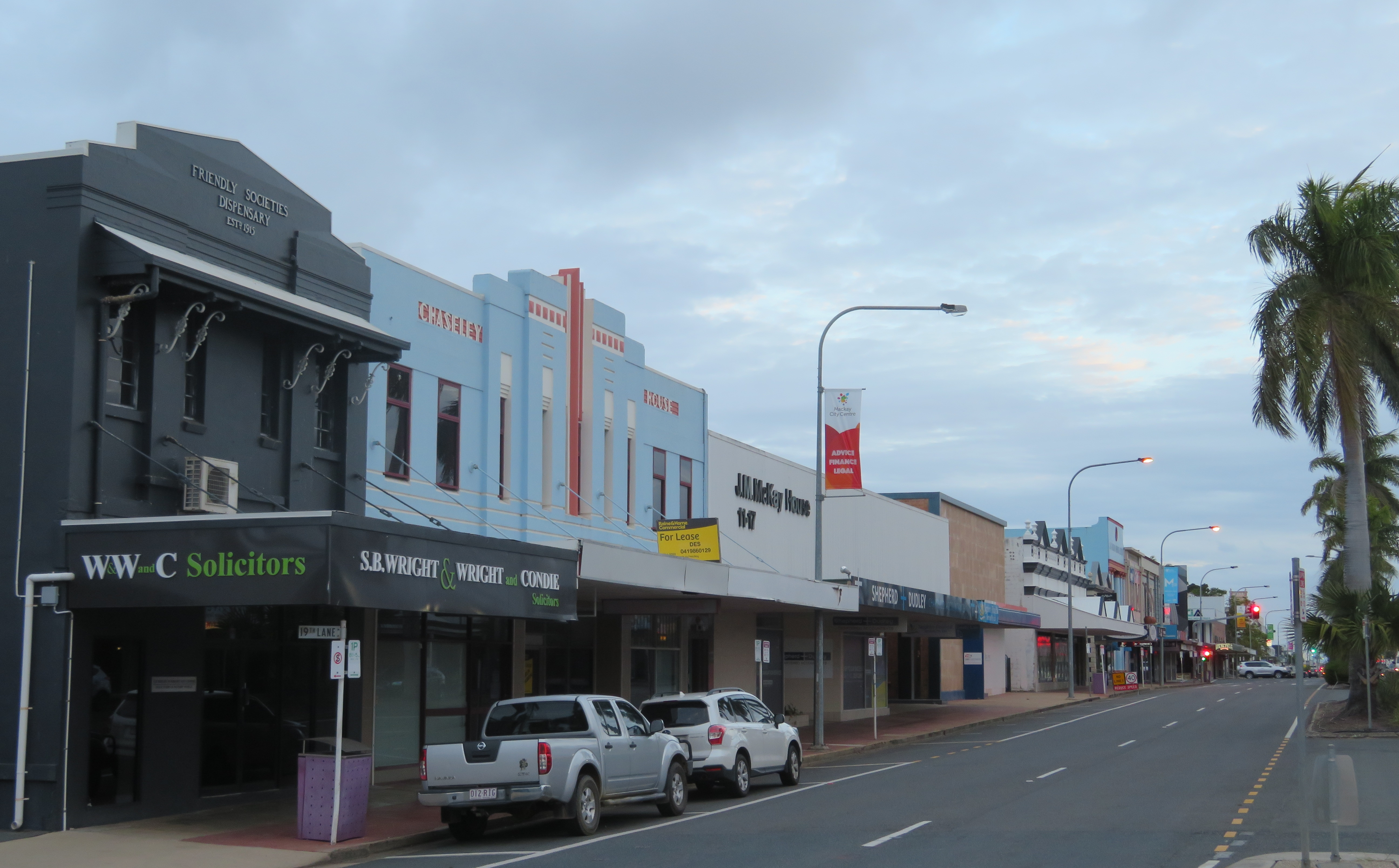 Victoria Street, Mackay, Australien